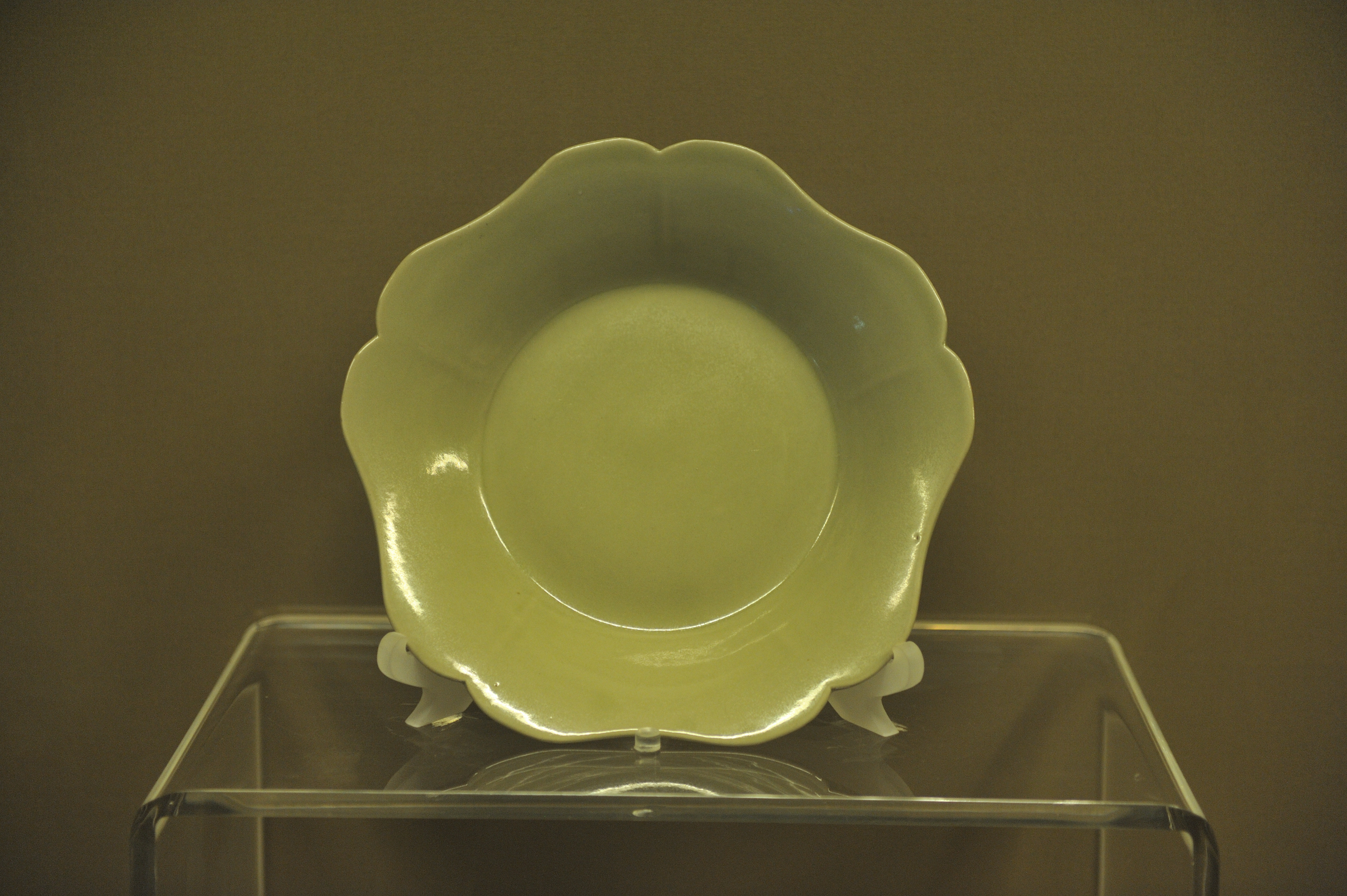 陕西历史博物馆藏法门寺地宫出土秘色盘